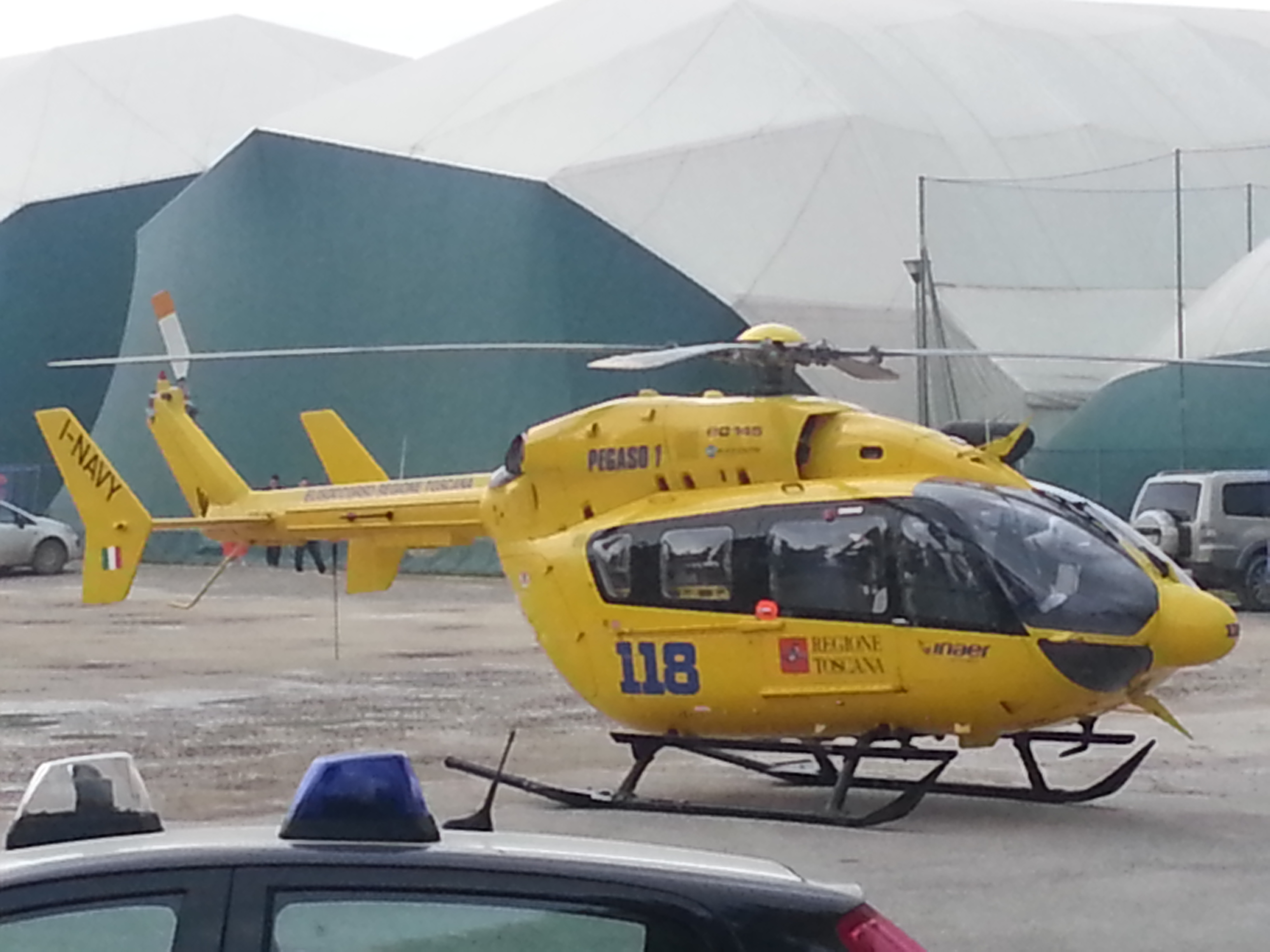 elicopter ambulance Tuscany Pegaso 1 EC-145 I-NAVY Base: Ospedale Firenze Sud - Ponte a Niccheri